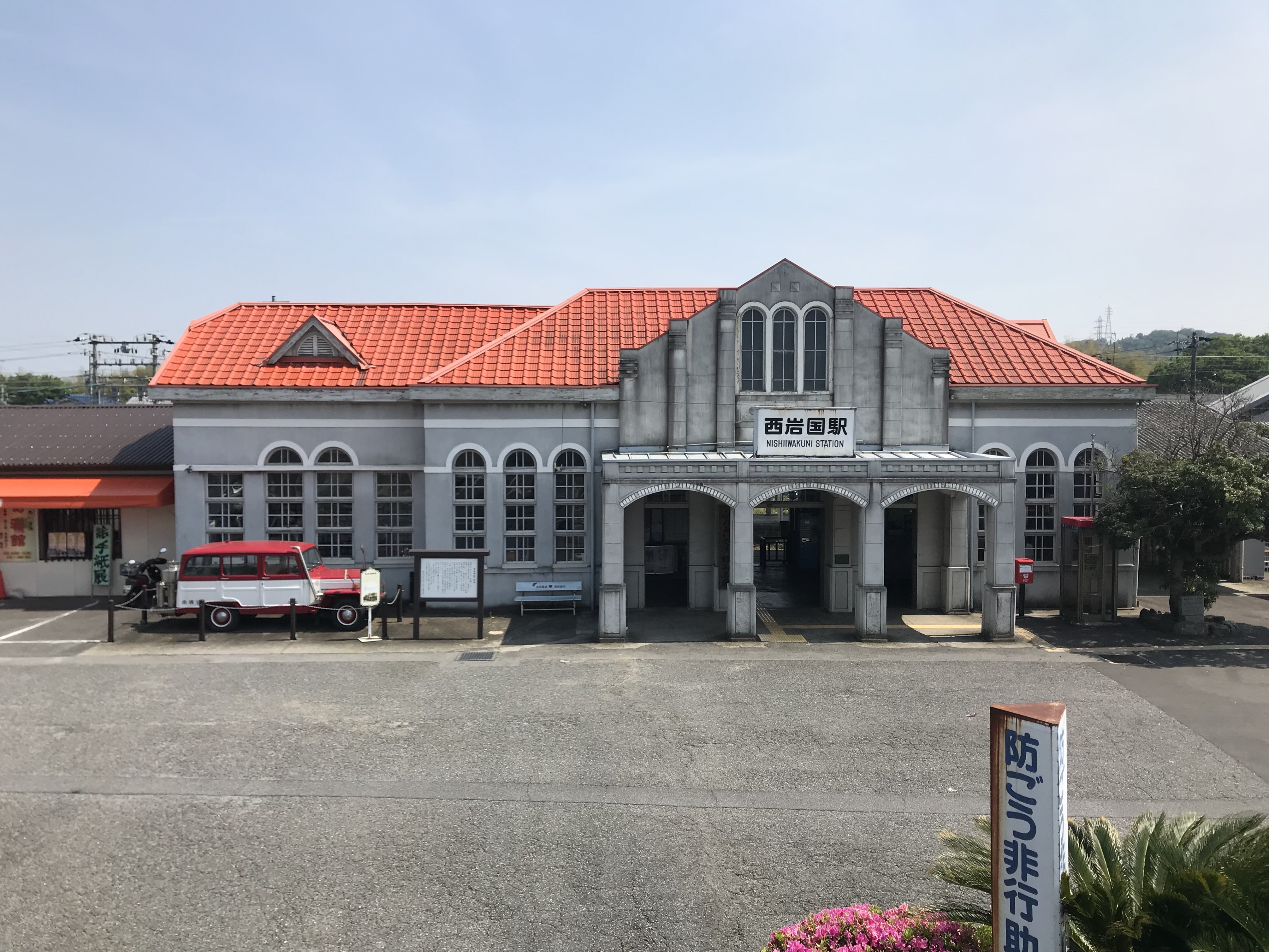 駅前の歩道橋より望む西岩国駅駅舎